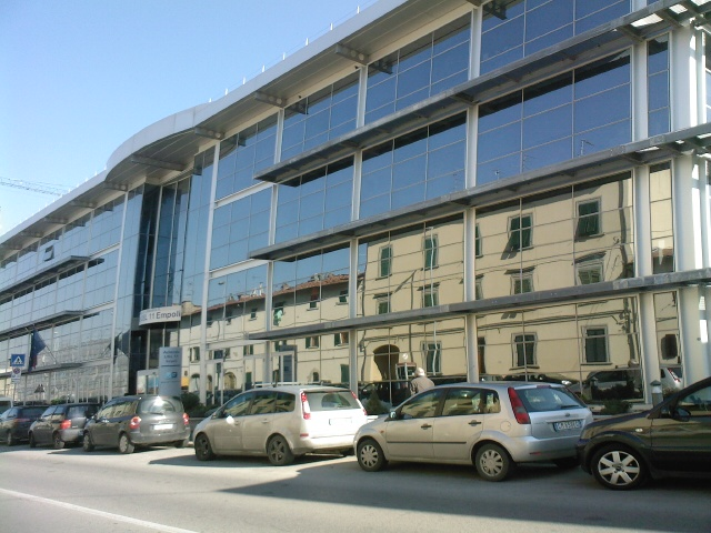 Centro direzionale USL11 Empoli